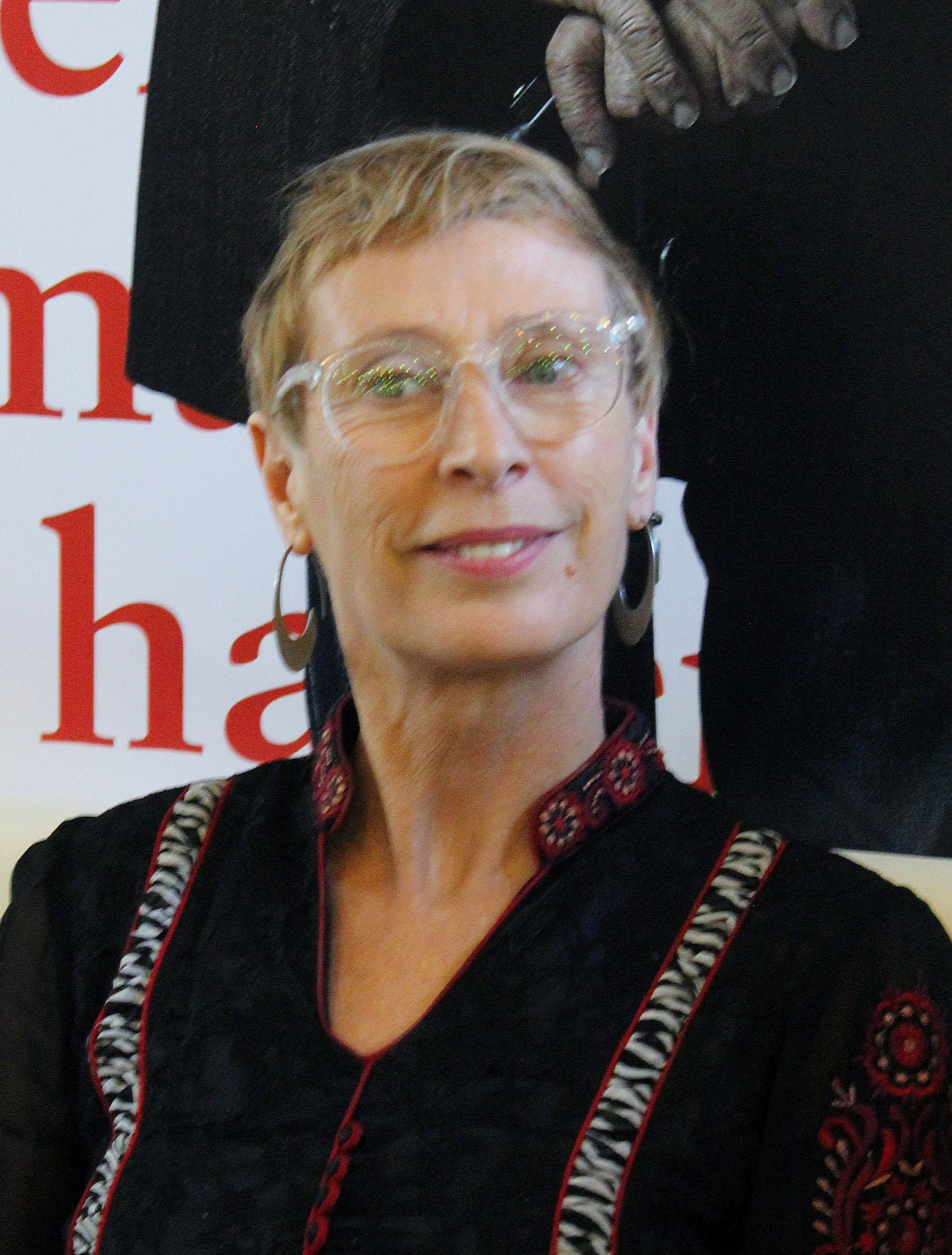 La actriz, directora, guionista y dramaturga chilena María Izquierdo Huneeus en la Feria Internacional del Libro de Santiago 2018.